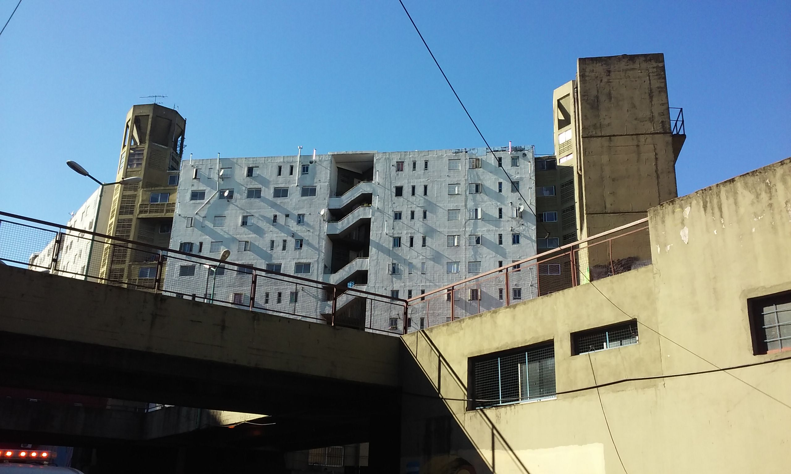 Conjunto Comandante Piedrabuena en el barrio de Mataderos, ciudad de Buenos Aires. Desde el corazón del barrio, en 2 de Abril y Montiel.